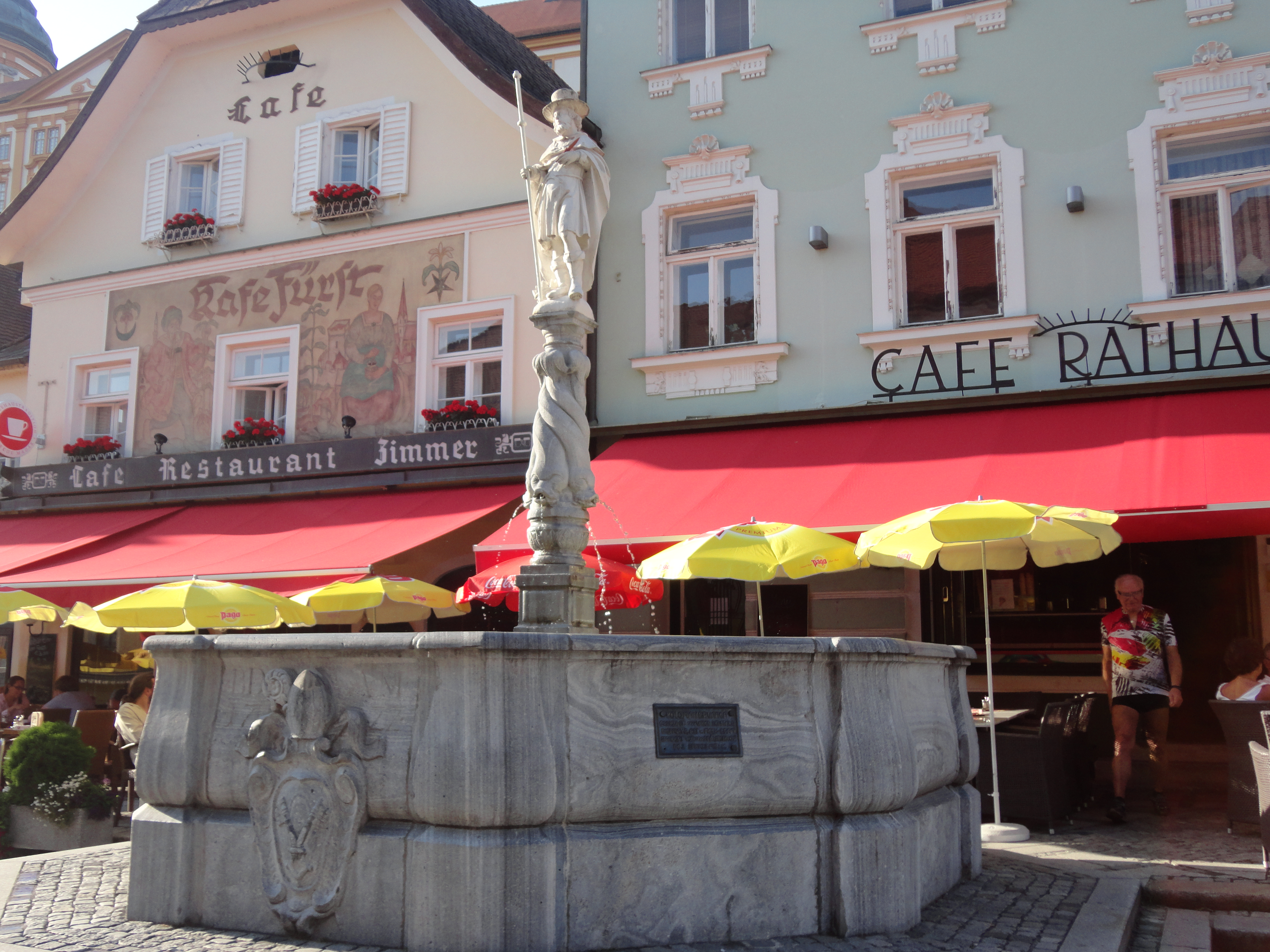 Kolomanibrunnen auf dem Rathausplatz, Melk